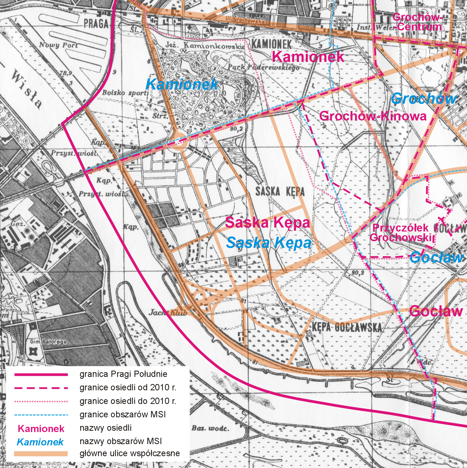 Mapa Saskiej Kępy w Warszawie. Mapa topograficzna Wojskowego Instytutu Geograficznego 1:25 000 ark.: Pas 40-Słup 32-B Warszawa-Mokotów, z 1931 r. z naniesionym przebiegiem współczesnych ważniejszych ulic oraz granicami osiedli uchwalonymi przez Radę Dzielnicy Praga Południe i granicami obszarów wg Miejskiego Systemu Informacji